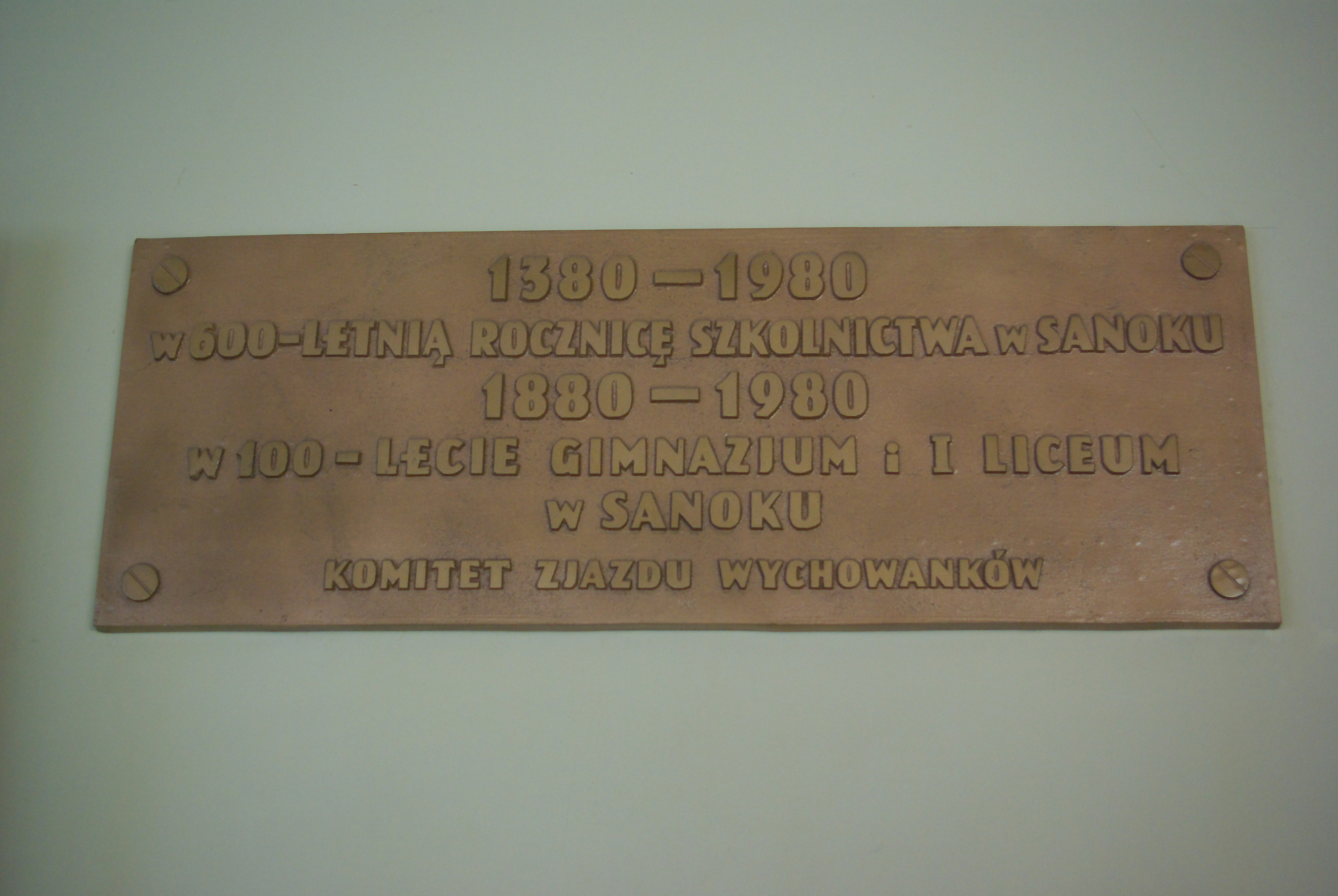 I Liceum Ogólnokształcące im. Komisji Edukacji Narodowej w Sanoku, tablica pamiątkowa